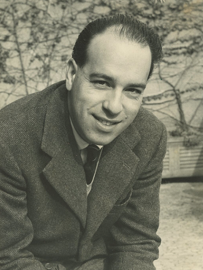 Ottiero Ottieri